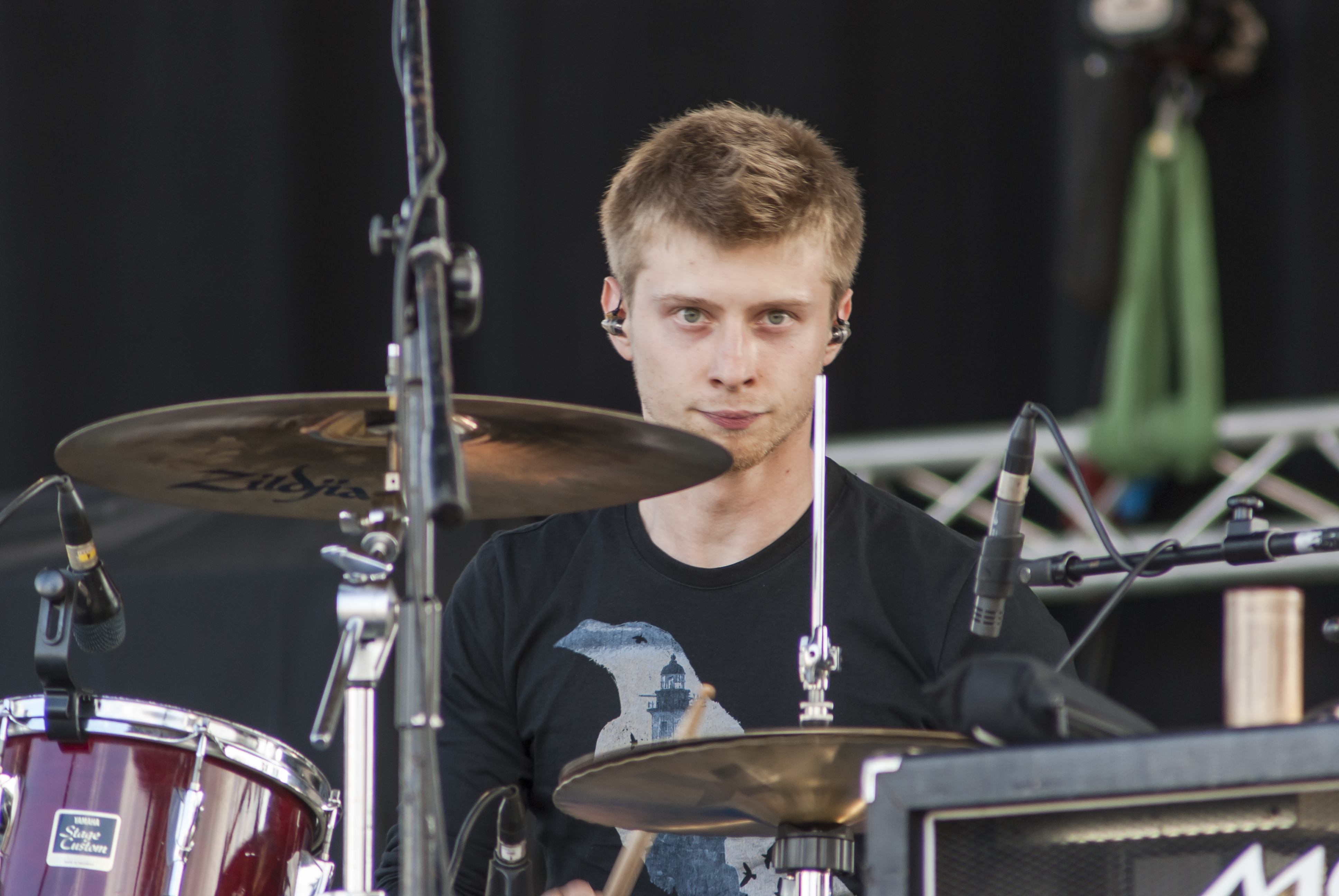 Michał Sobczyk z zespołu Koniec Świata na Festiwalu Ursynalia 2014